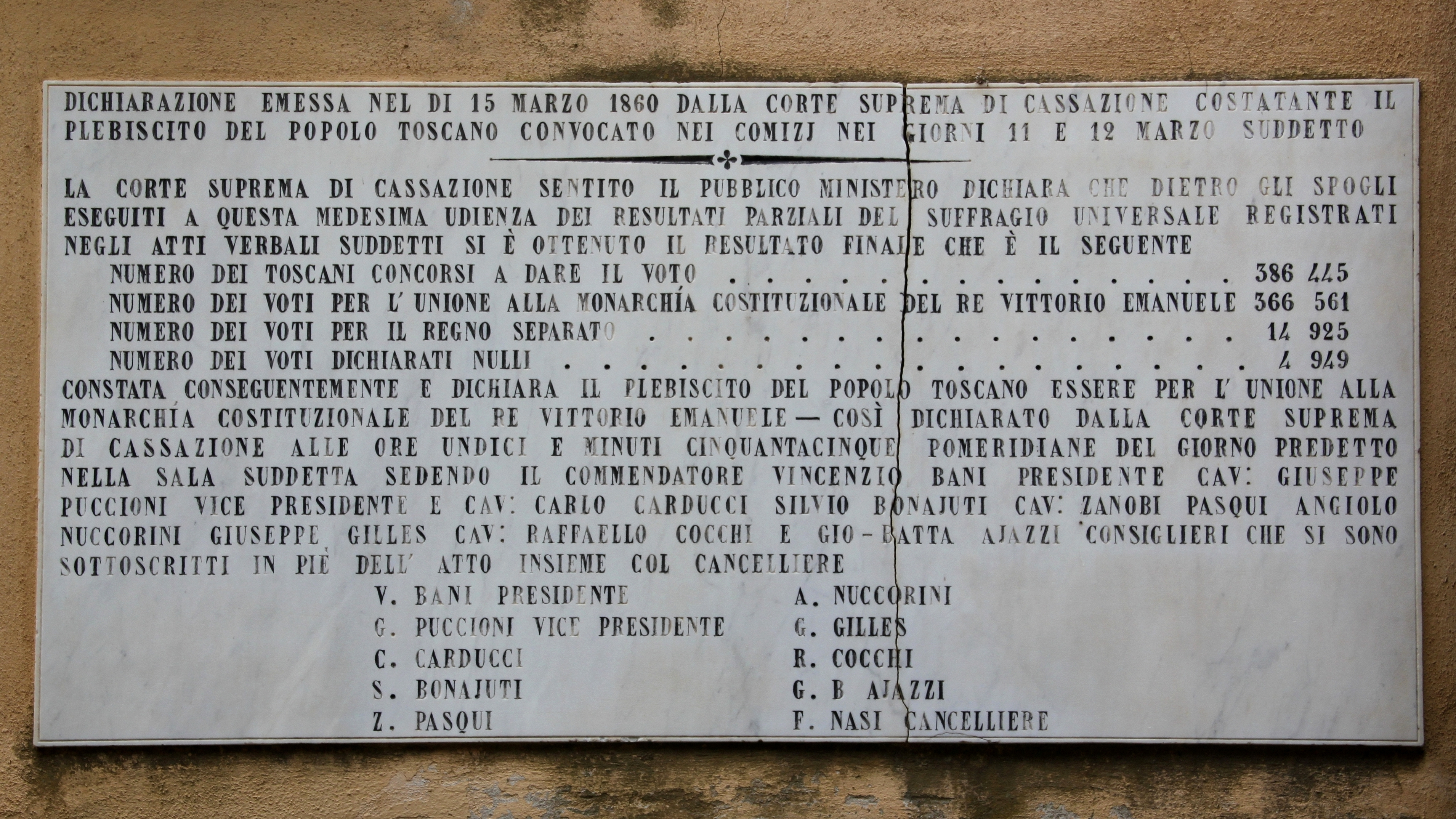 Campiglia Marittima (Via Roma): Targa Dichiarazione emessa nel di 15 Marzo 1860.